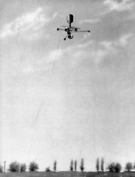 A PKZ 2-helikopter 50 méter magasságban